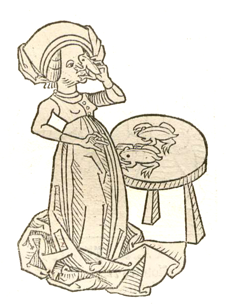 Abbildung von Cerusa - Bleiweiß